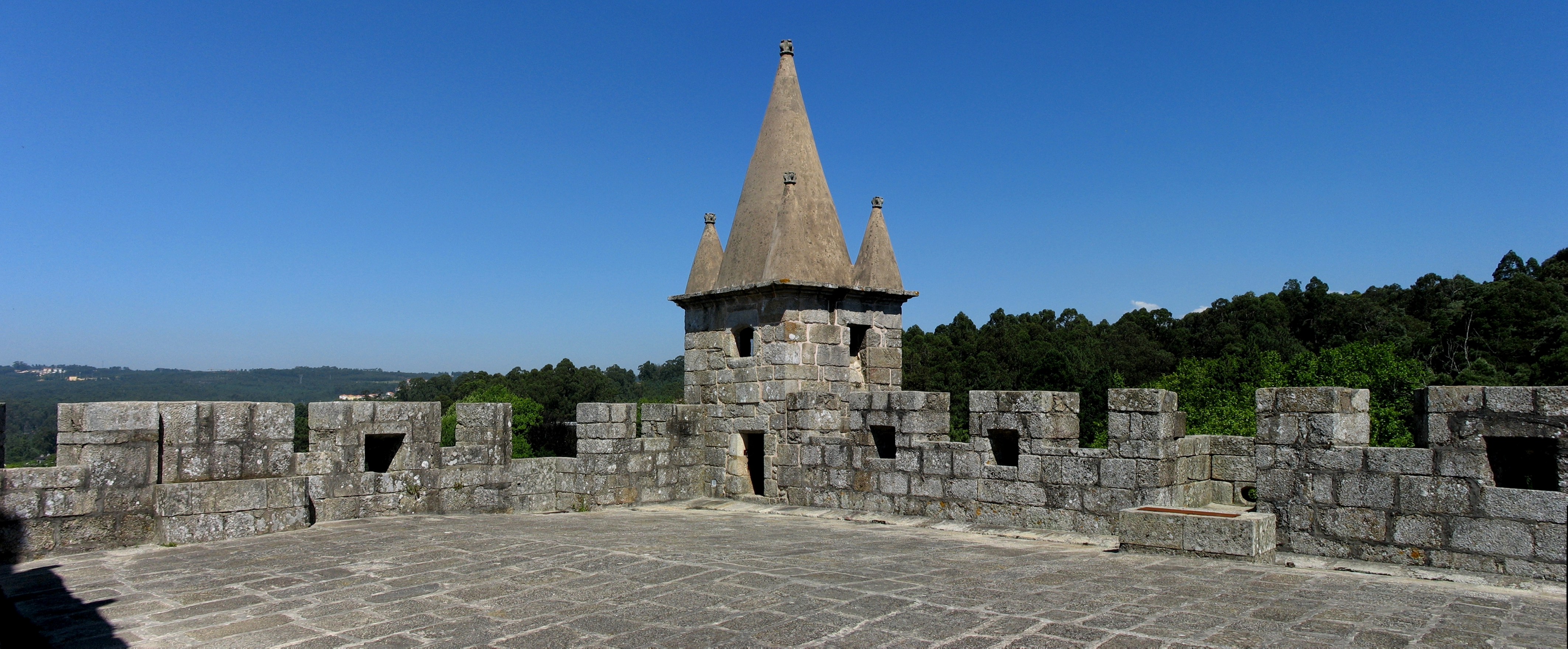 Uma das Torres do Castelo de Santa Maria da Feira